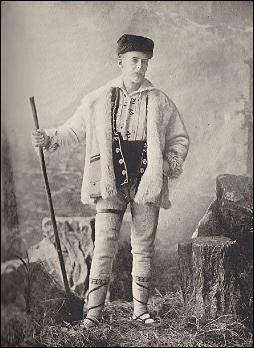 Джеймс Баучер